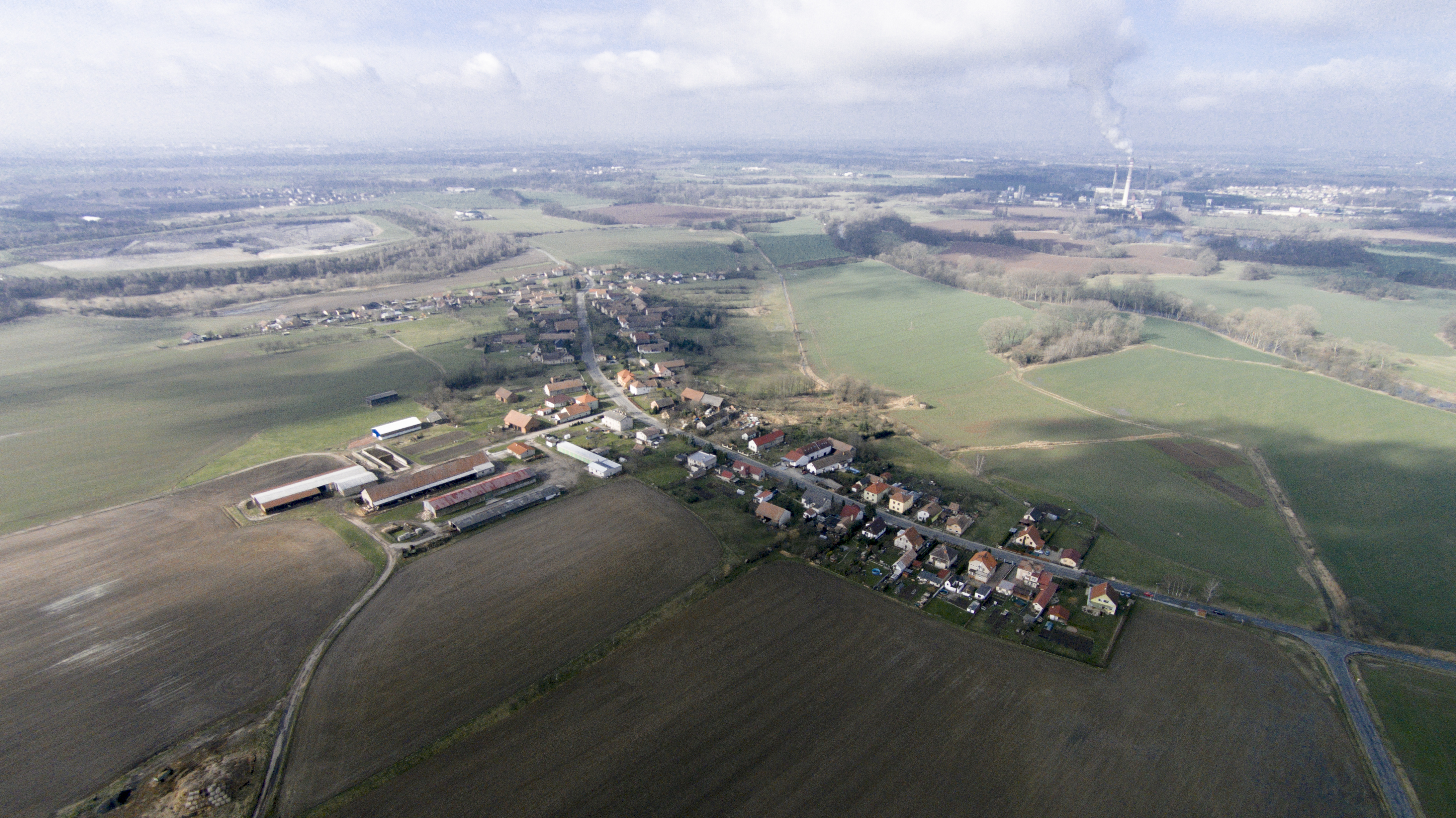 Letecký snímek Bukovina nad Labem (Pardubický kraj)